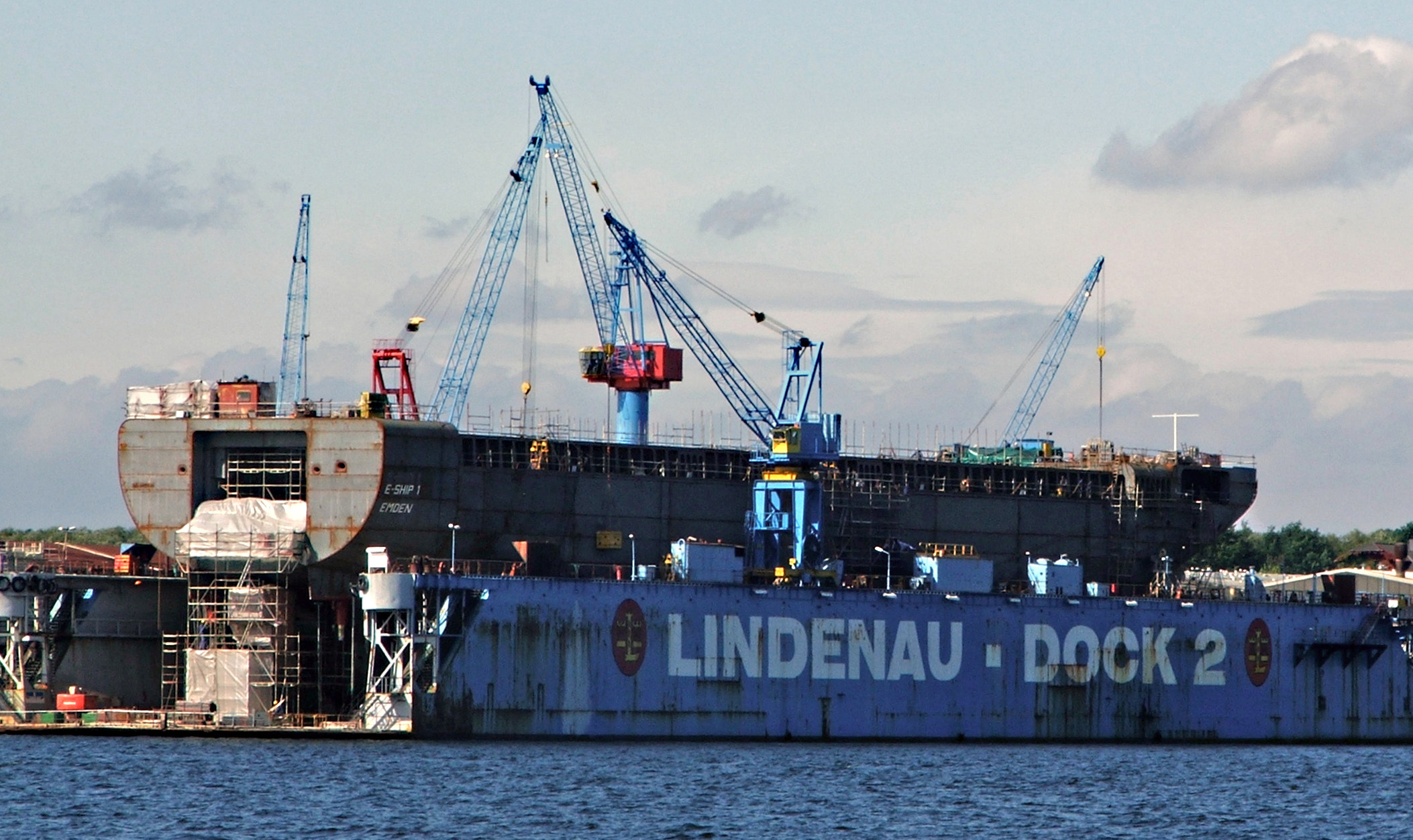 Rumpf von E-Ship 1 im Dock der Kieler Lindenau-Werft